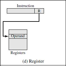 Adresimi me regjistër